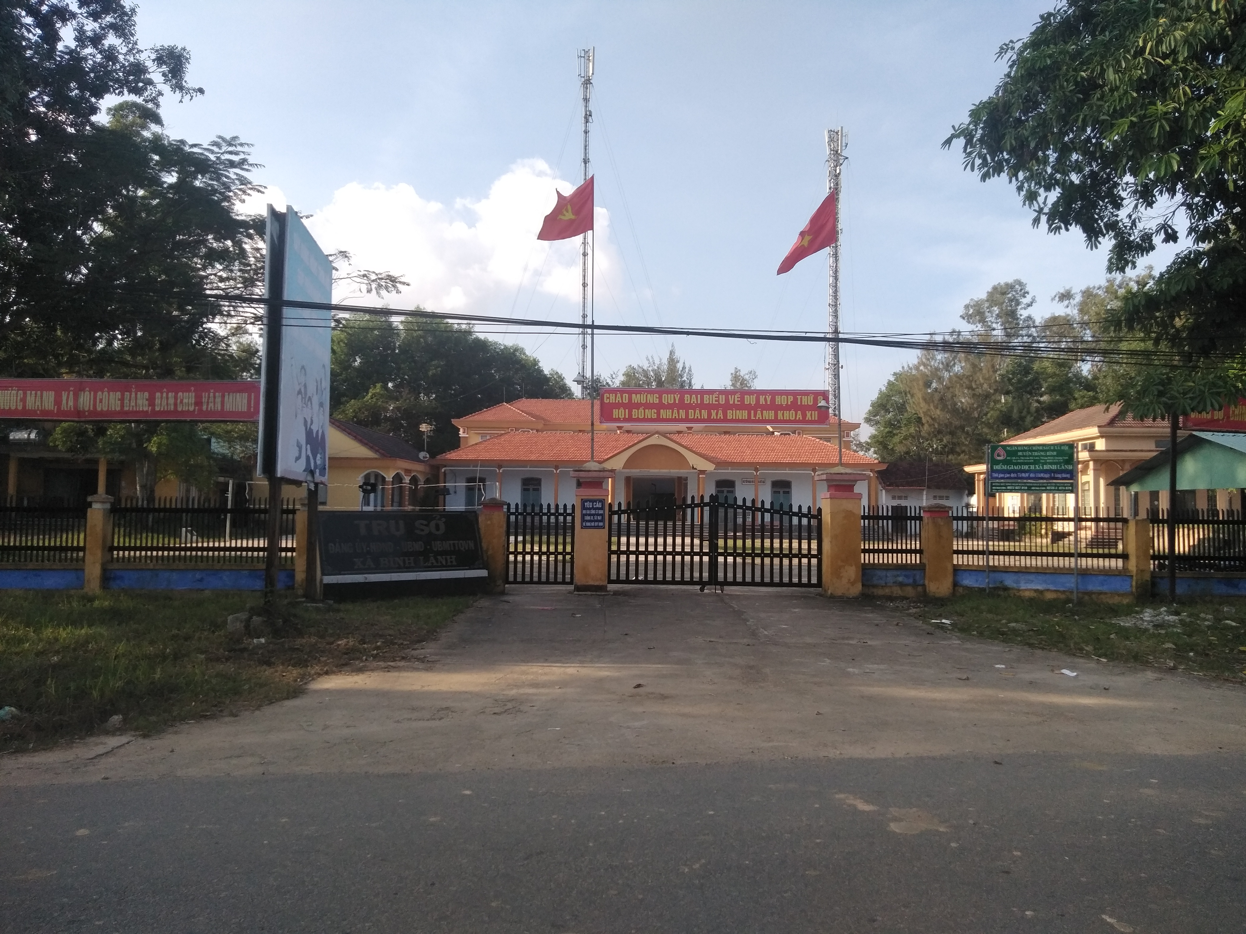 UBND xã Bình Lãnh, Thăng Bình, Quảng Nam